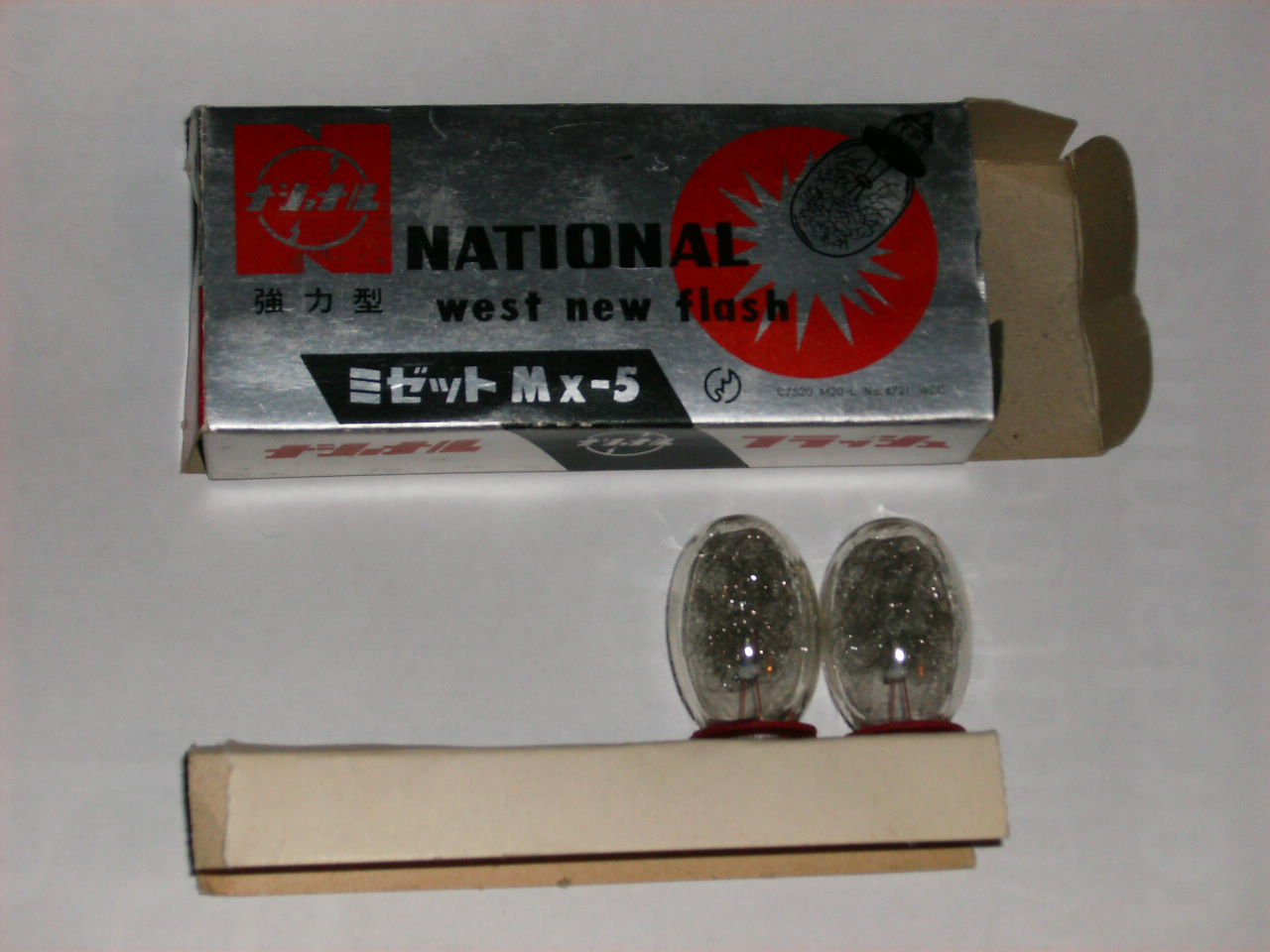 Flashlight for photography, brand: National as used 1950-1970.